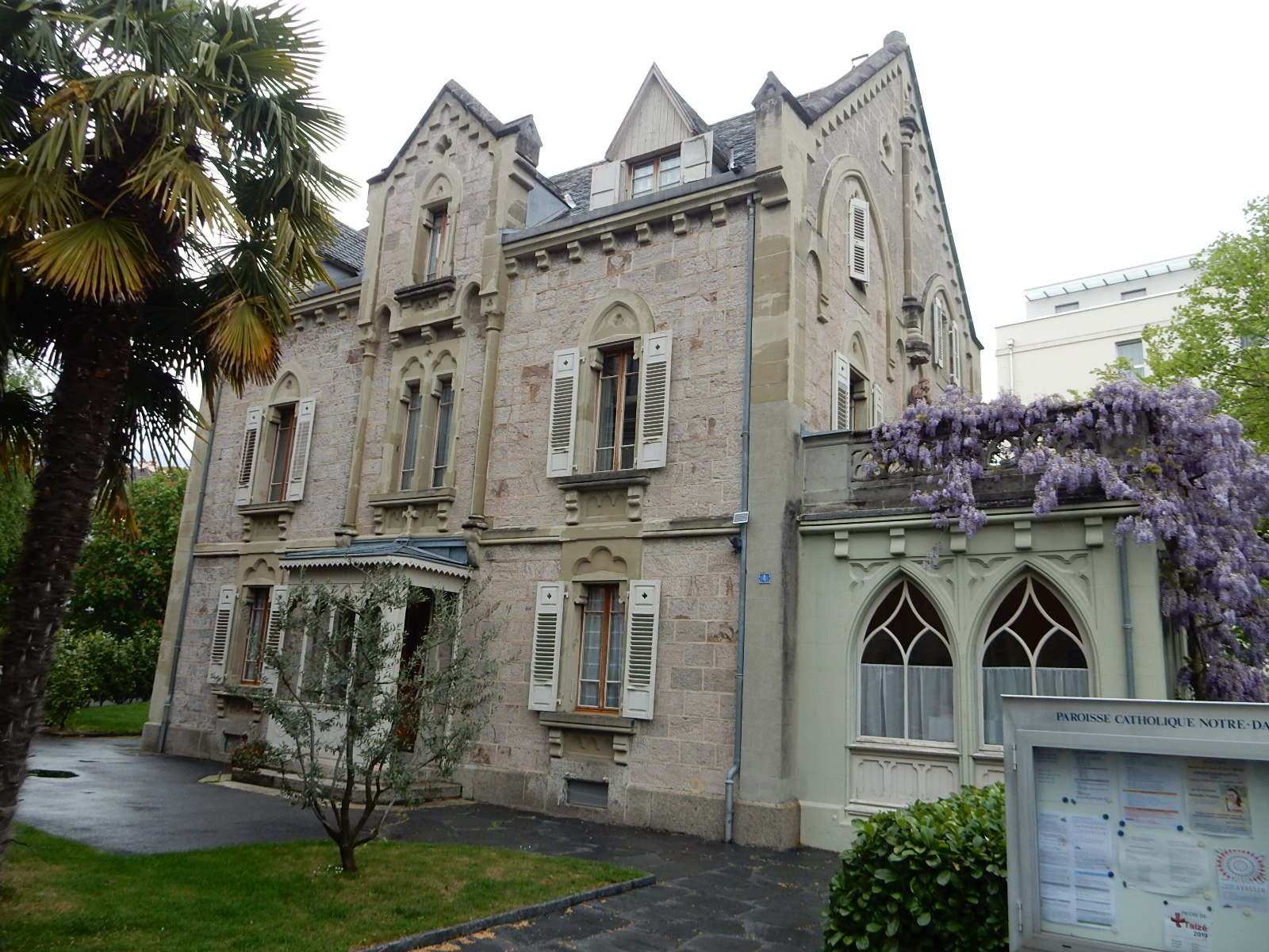 Presbytère catholique, vu du sud-ouest